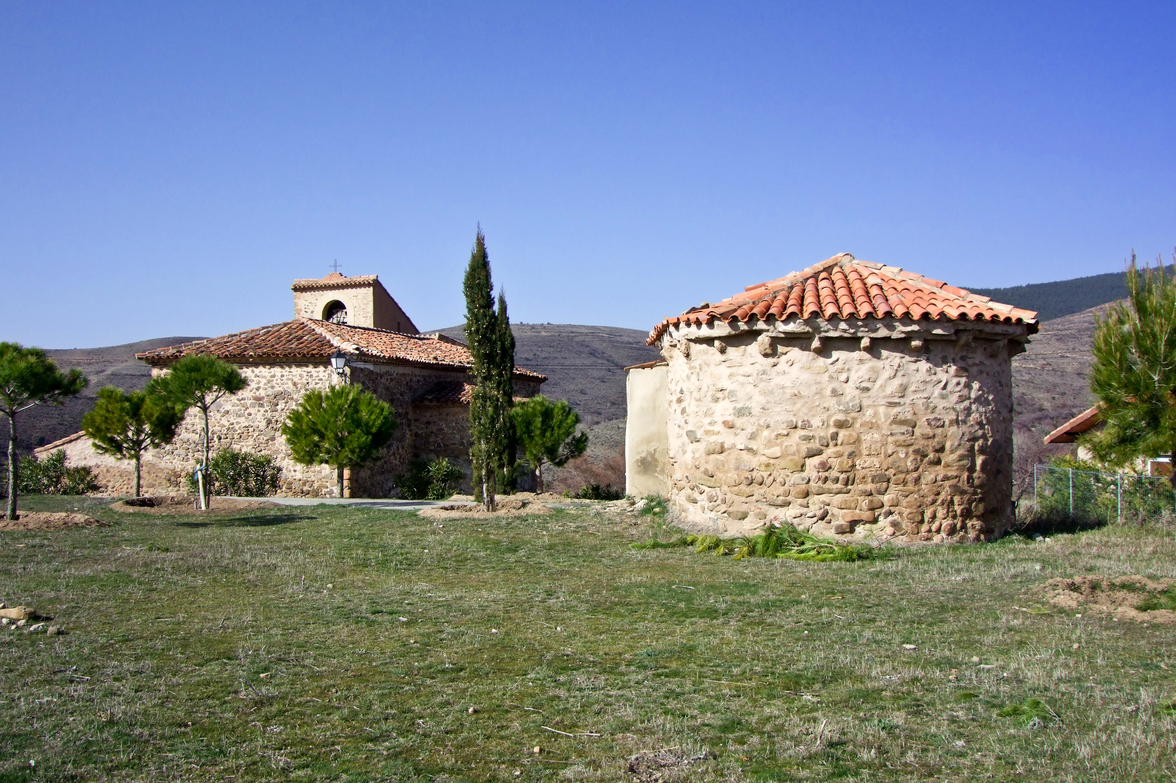 Abside románico en la localidad de Bergasillas Somera, La Rioja - España